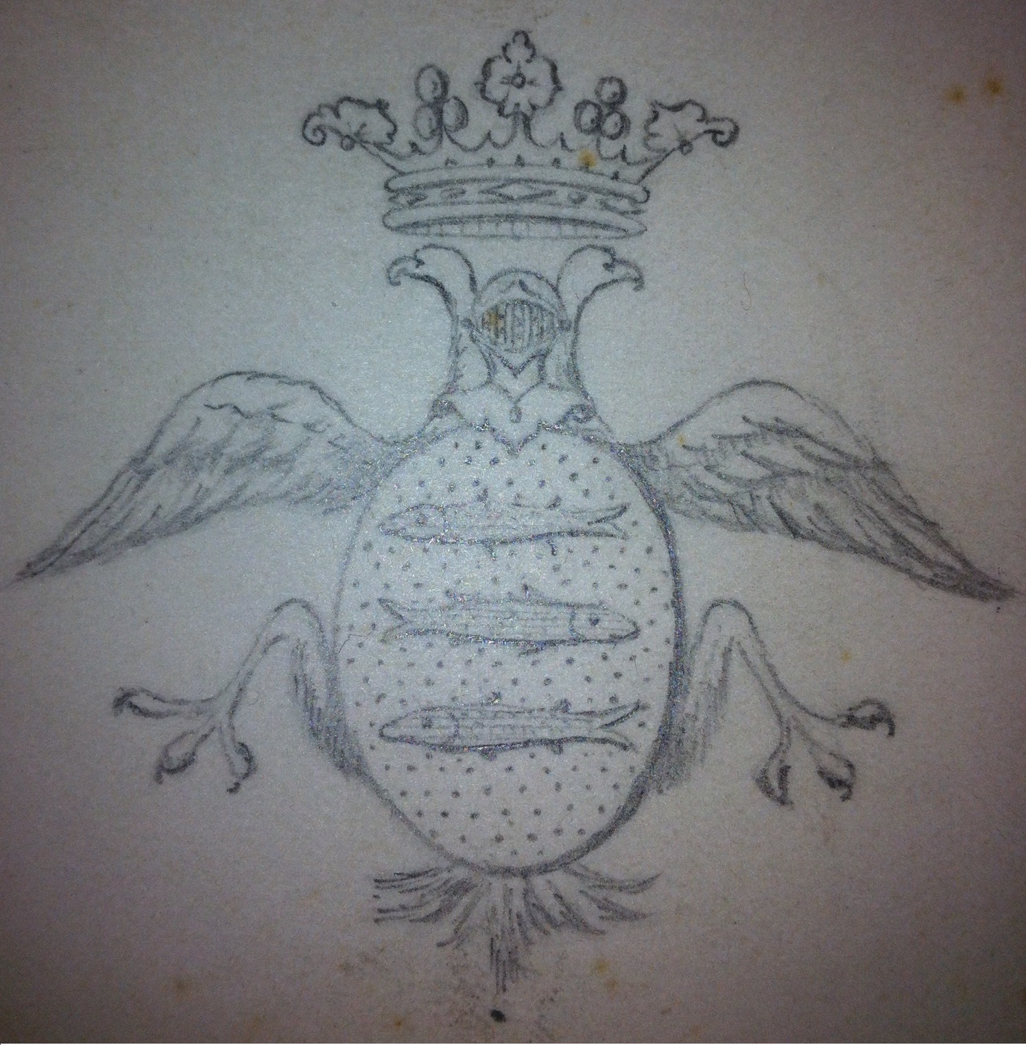 D'or aux trois poissons d'azur fascés l'un sur l'autre. Support: Une aigle bicéphale bécqué et cerré de gueule. Couronne et heaume de Marquis